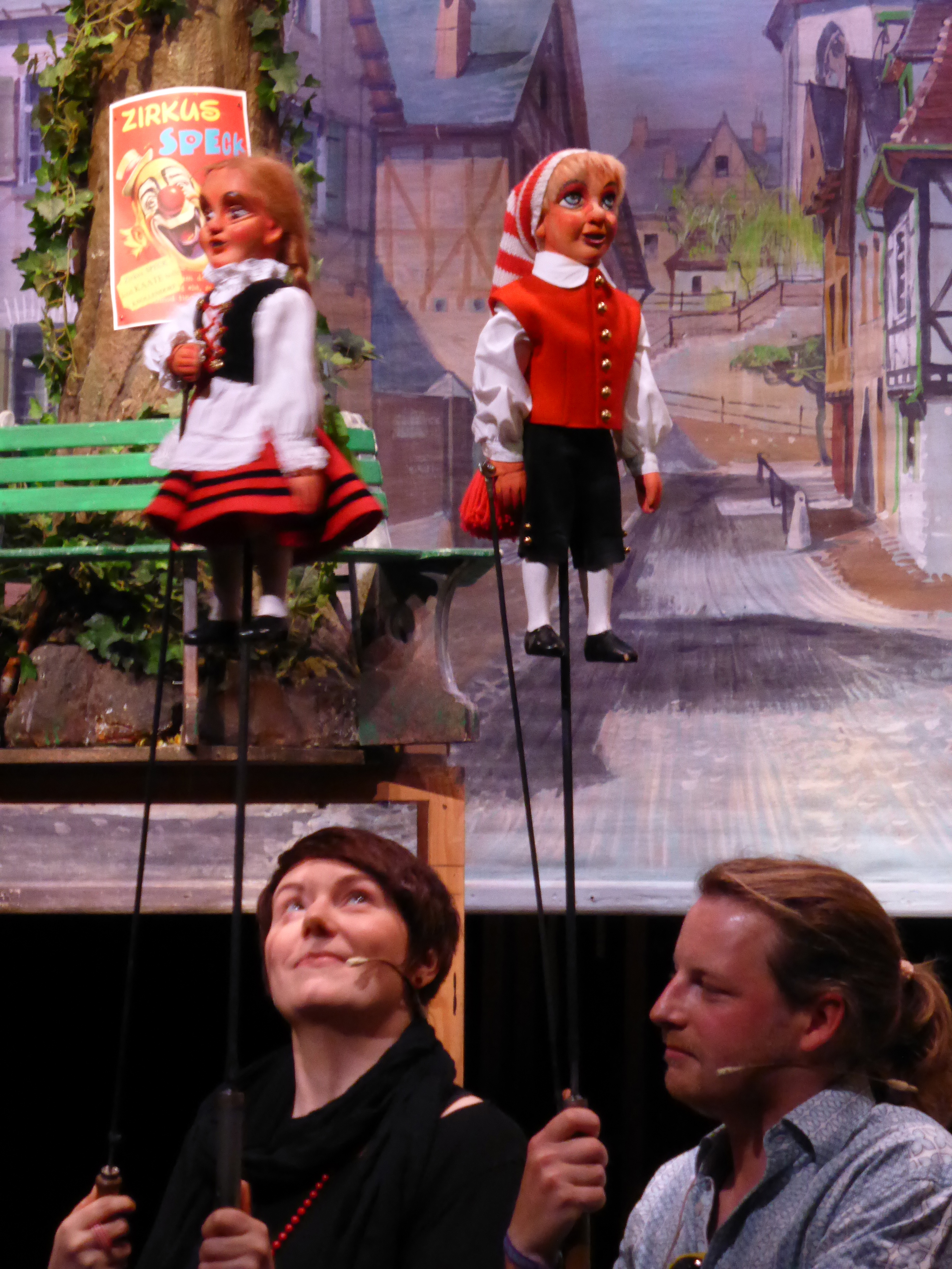 Hänneschen-Theater, "Hinger d'r Britz" im Mai 2016. Puppenspieler: Links: Verena Wessel Mitte: Stefan Mertens